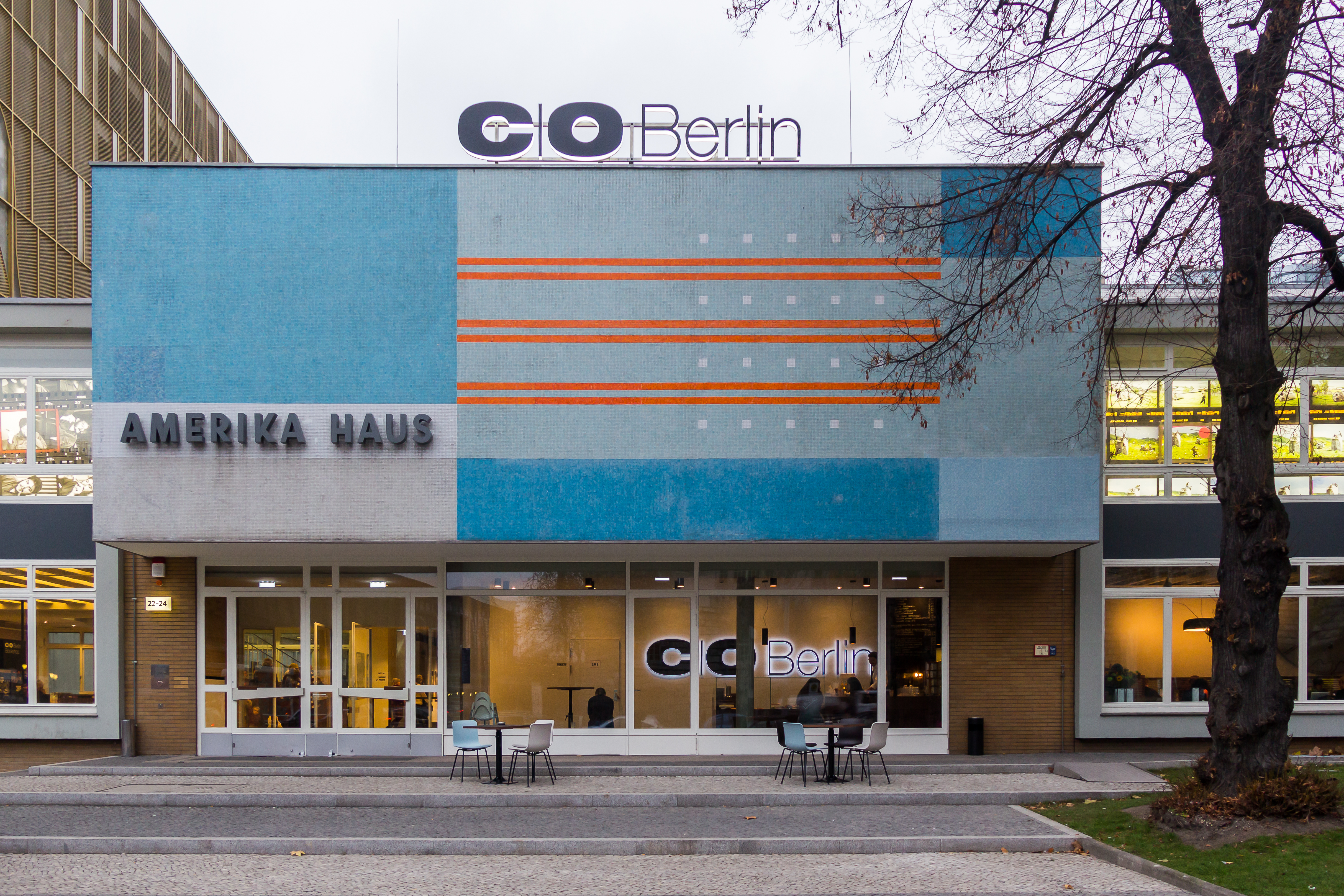 C/O Berlin im Amerika Haus